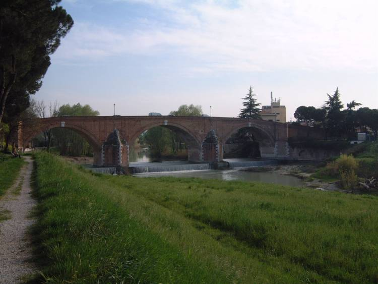 Je suis l'auteur de cette photo prise à Cesena en avril 2007